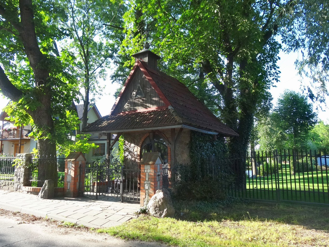 Zabudowa na osiedlu Prądy w Bydgoszczy